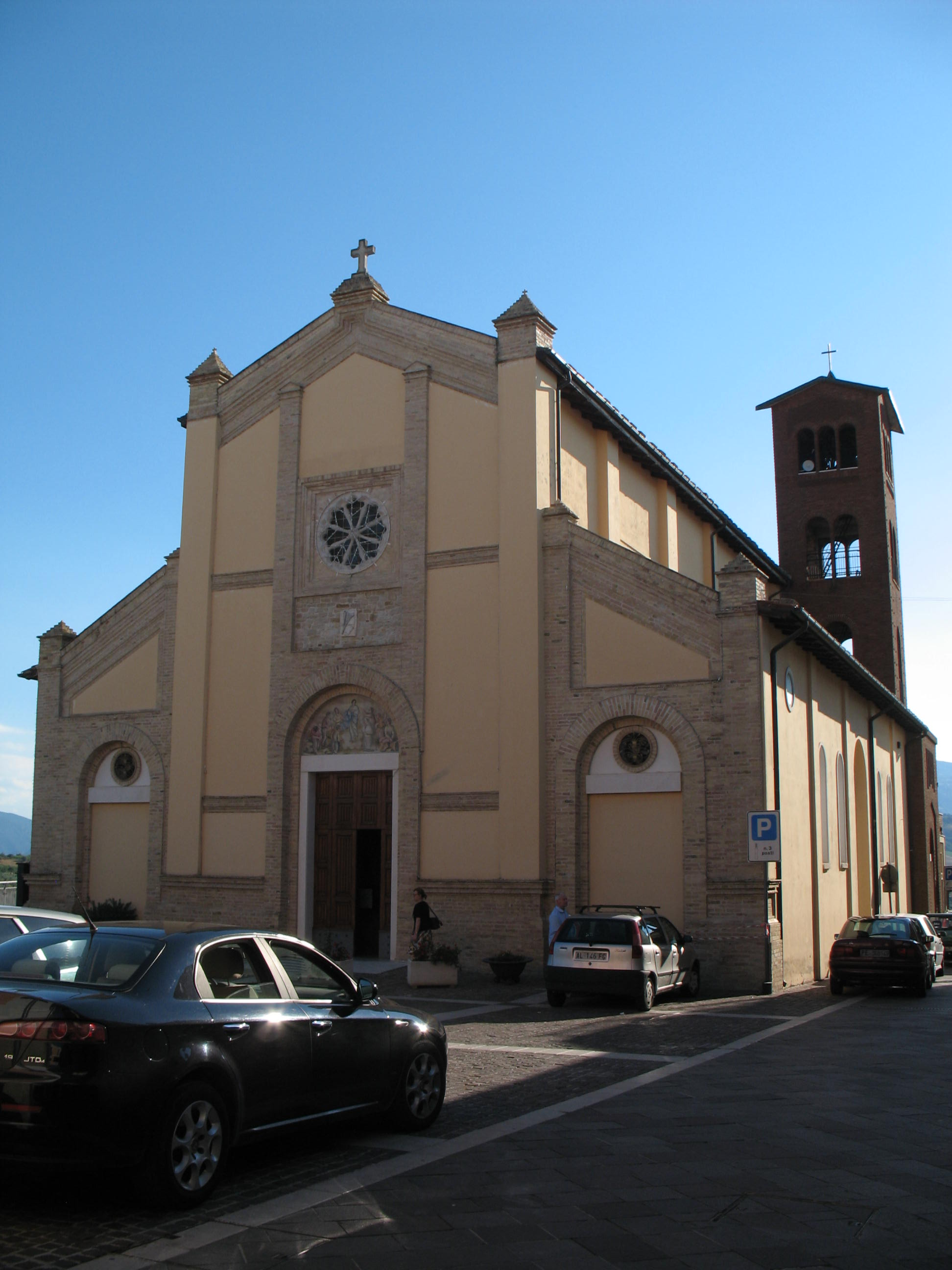 Facciata di una chiesa nel paese di Alanno